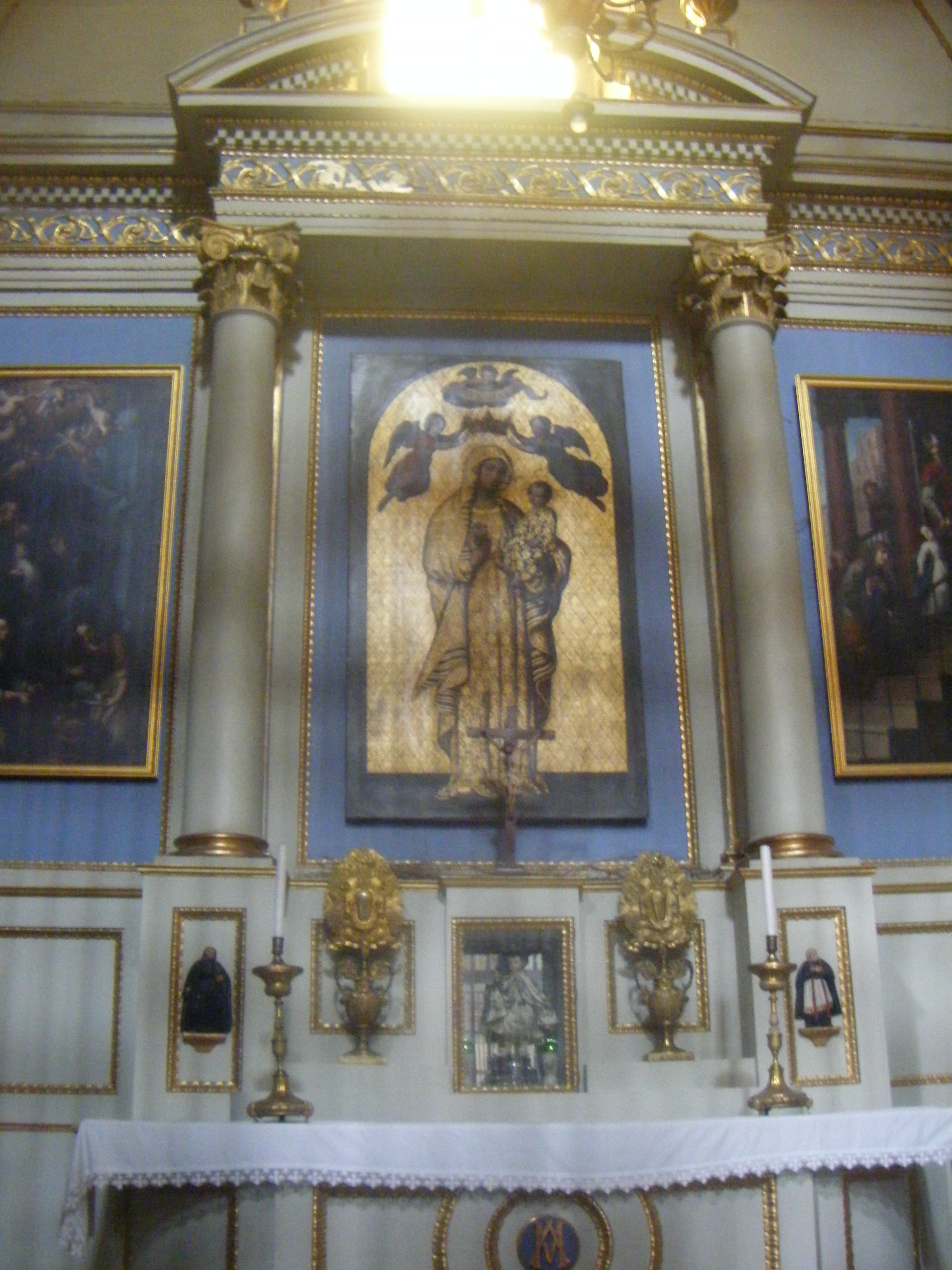 Nuestra Señora de la Antigua, retablo neoclásico de la capilla del mismo nombre. Catedral Metropolitana de la Ciudad de México.